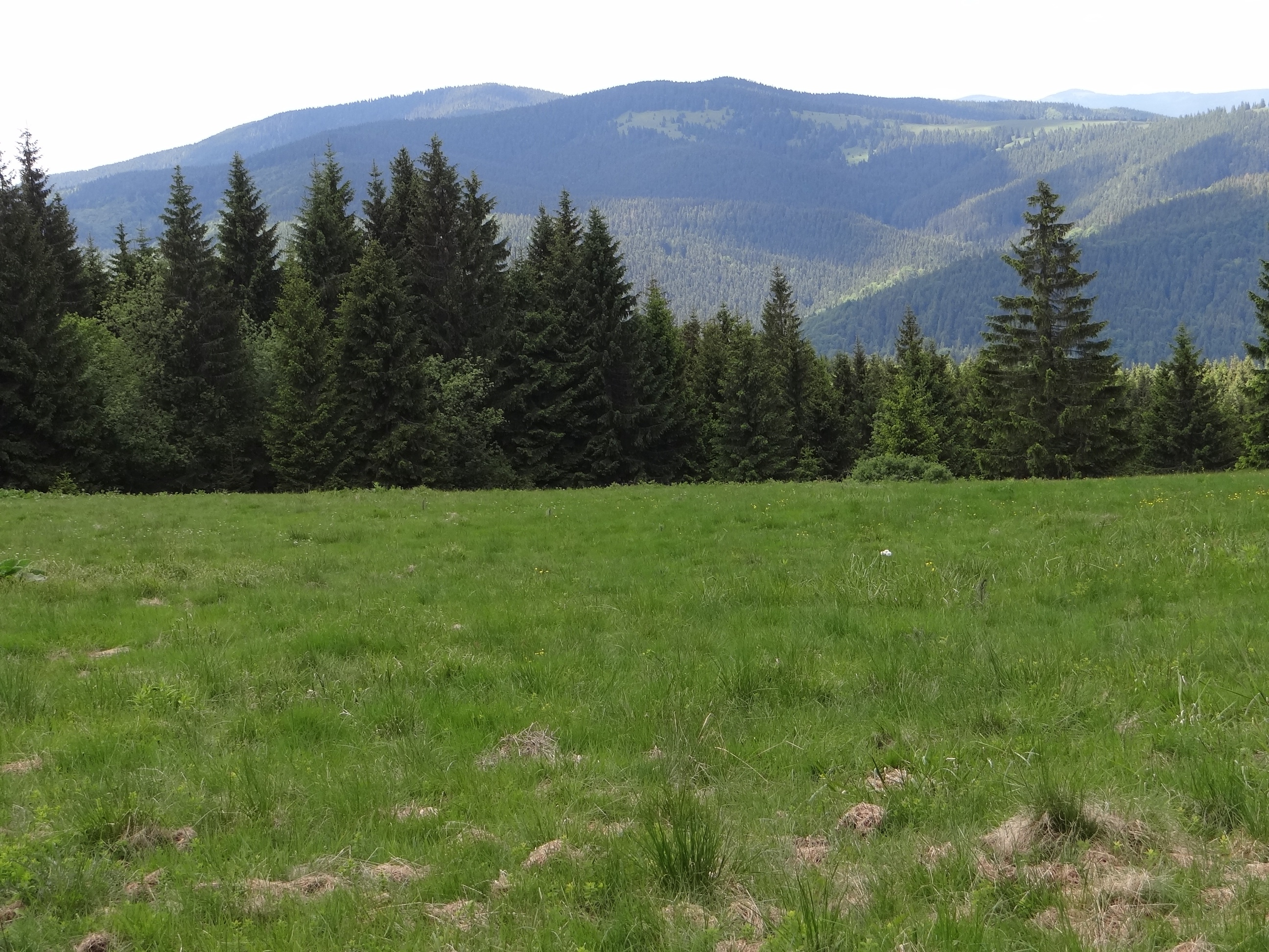 Mokradská hoľa, Parac, Paráč, Príslopec